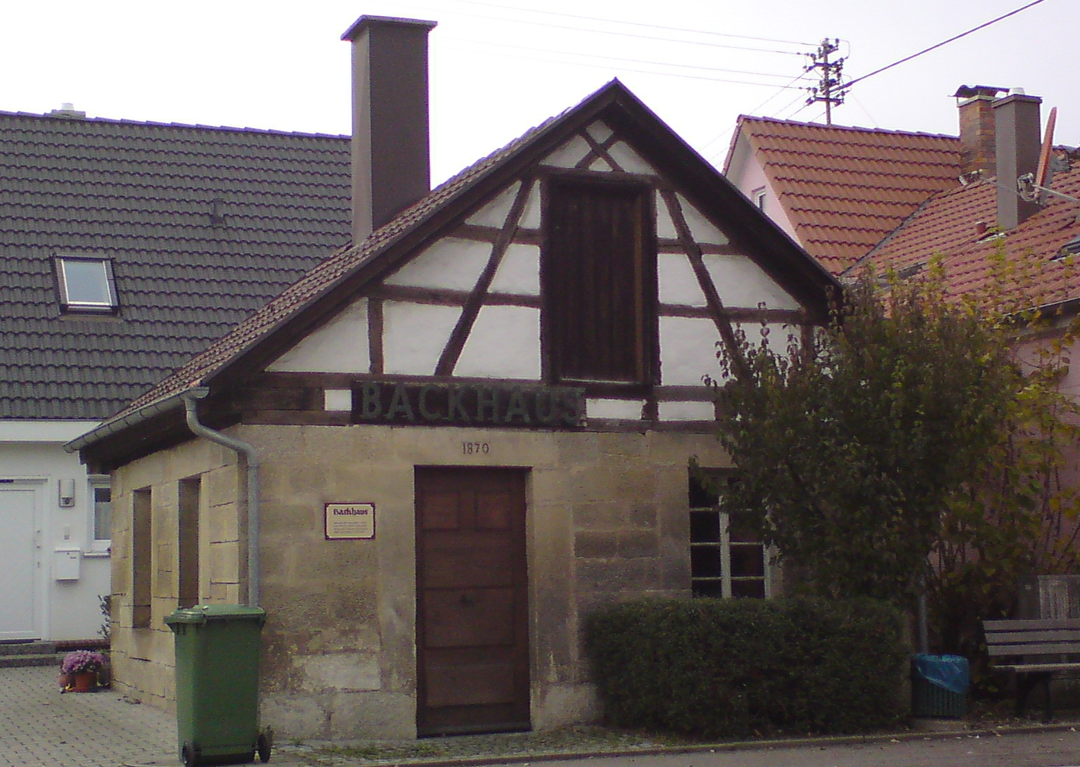 Ein Bild des Backhauses in Neuweiler